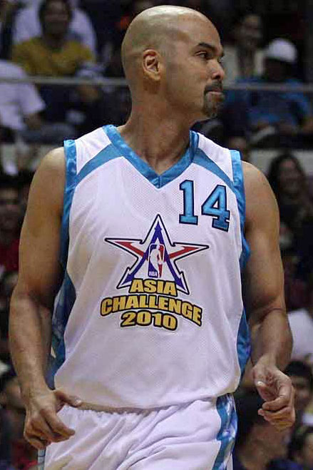 Filipino basketball player Benjie Paras.